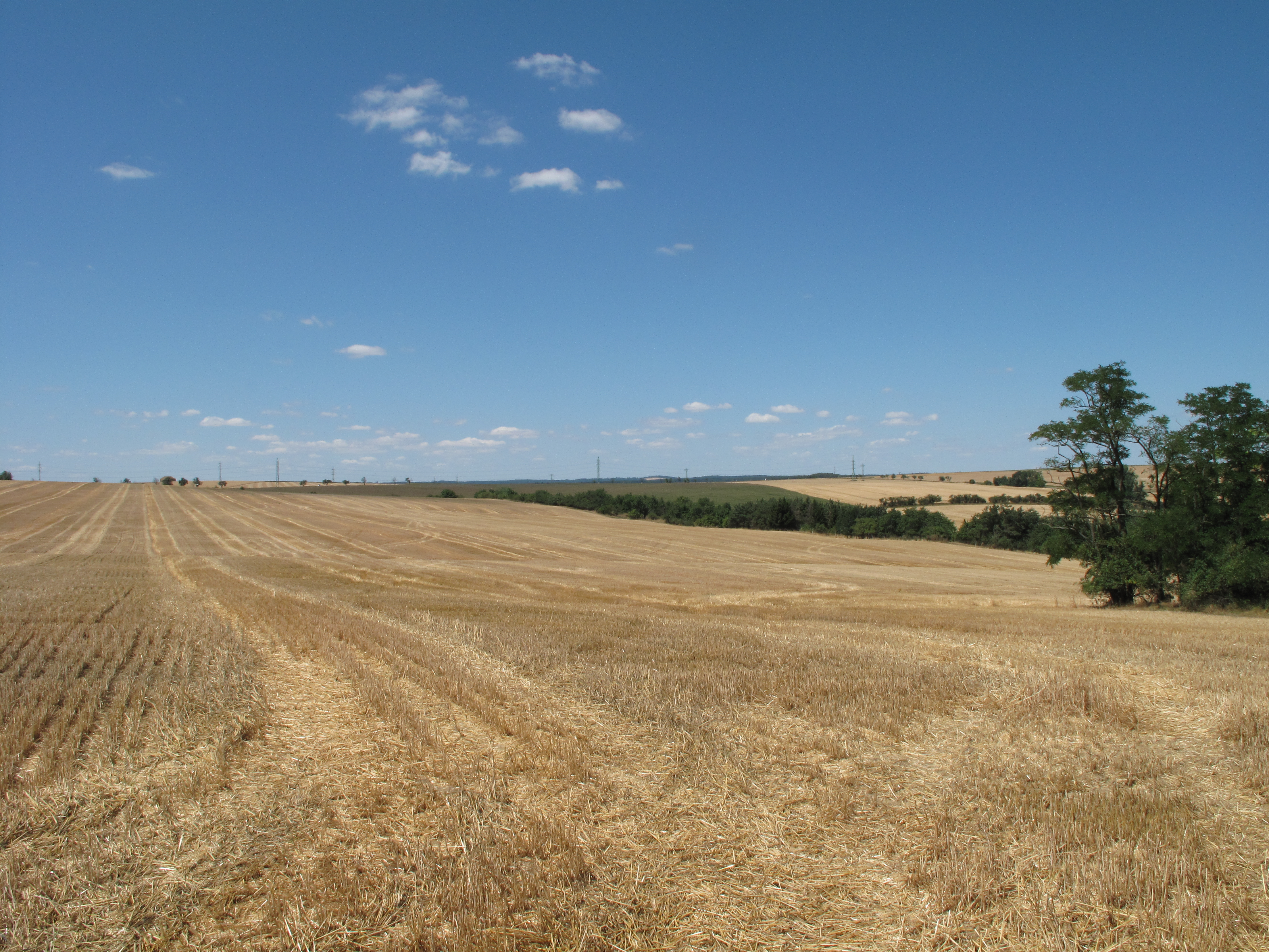 Přírodní památka Losolosy. Okres Znojmo, Česká republika.